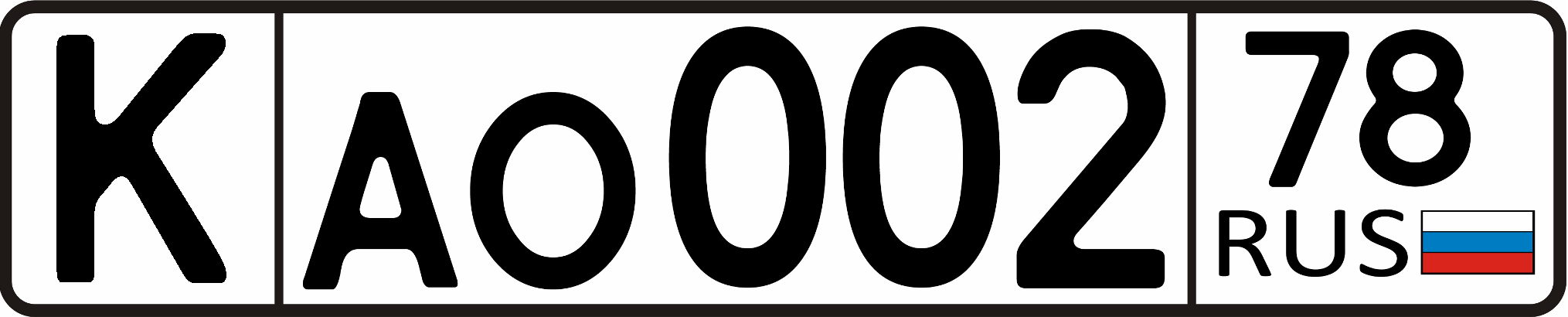 Номерной знак классических и ретро автомобилей